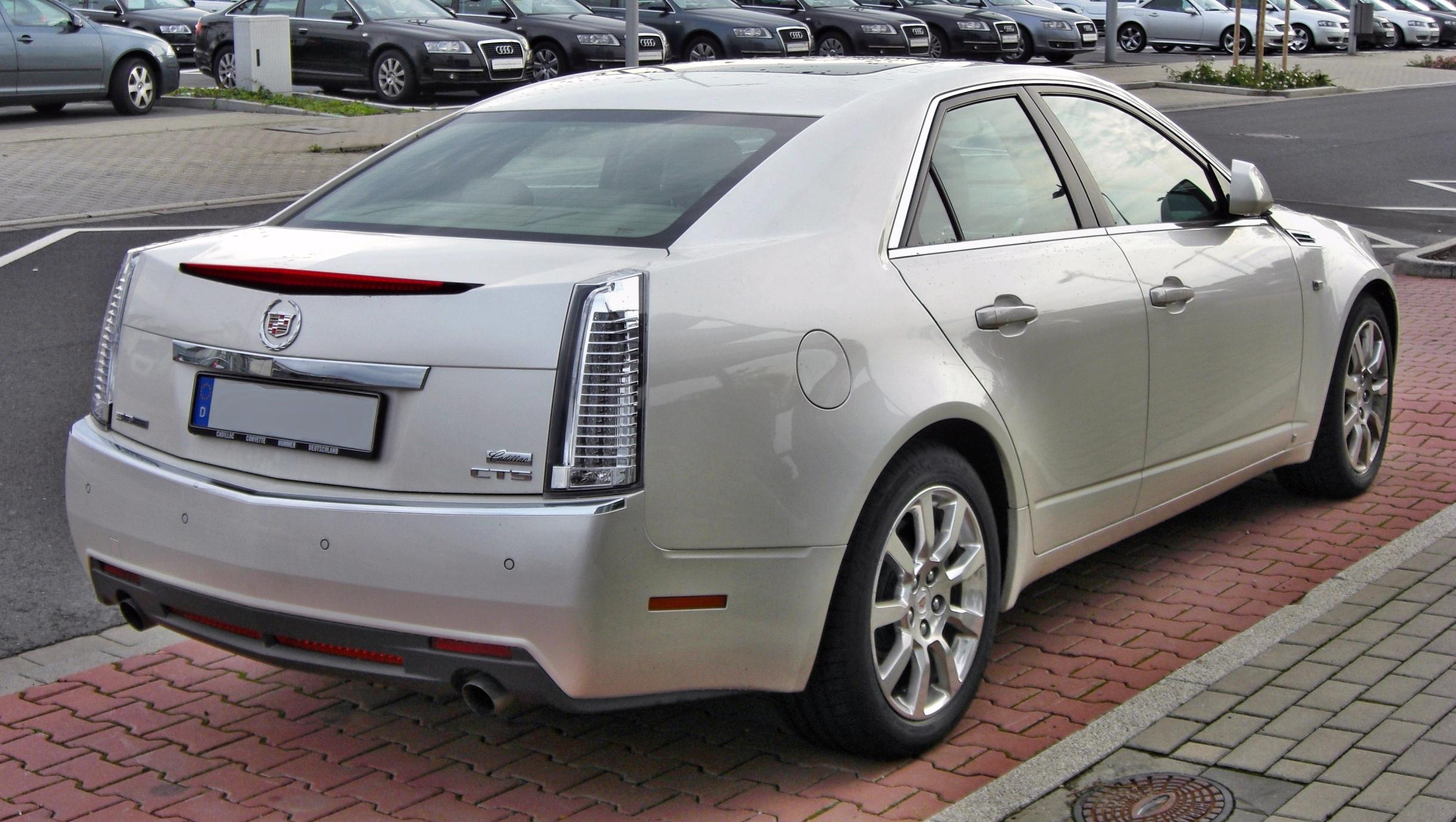 Cadillac CTS